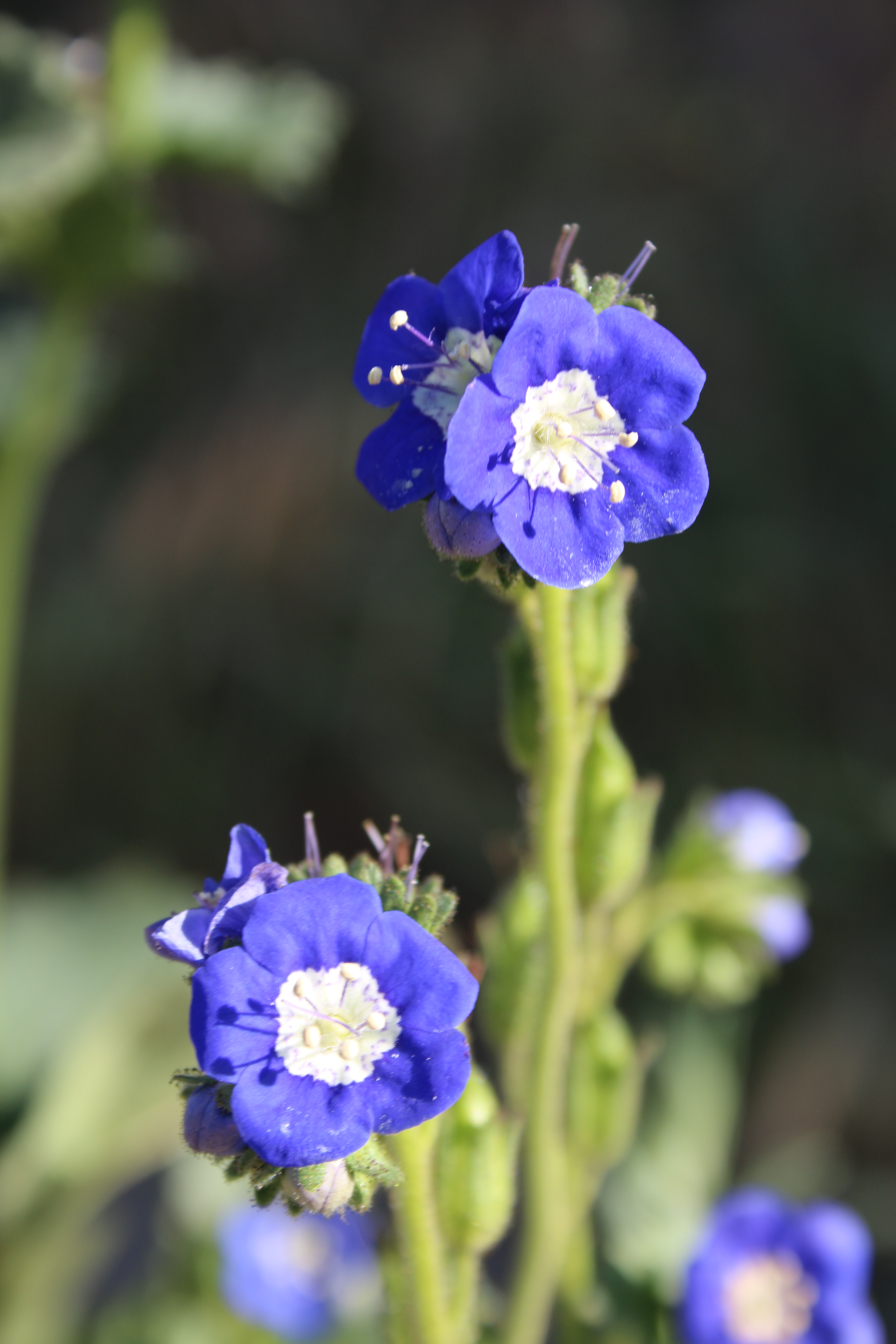 Phacelia viscida var. viscida (sticky phacelia)